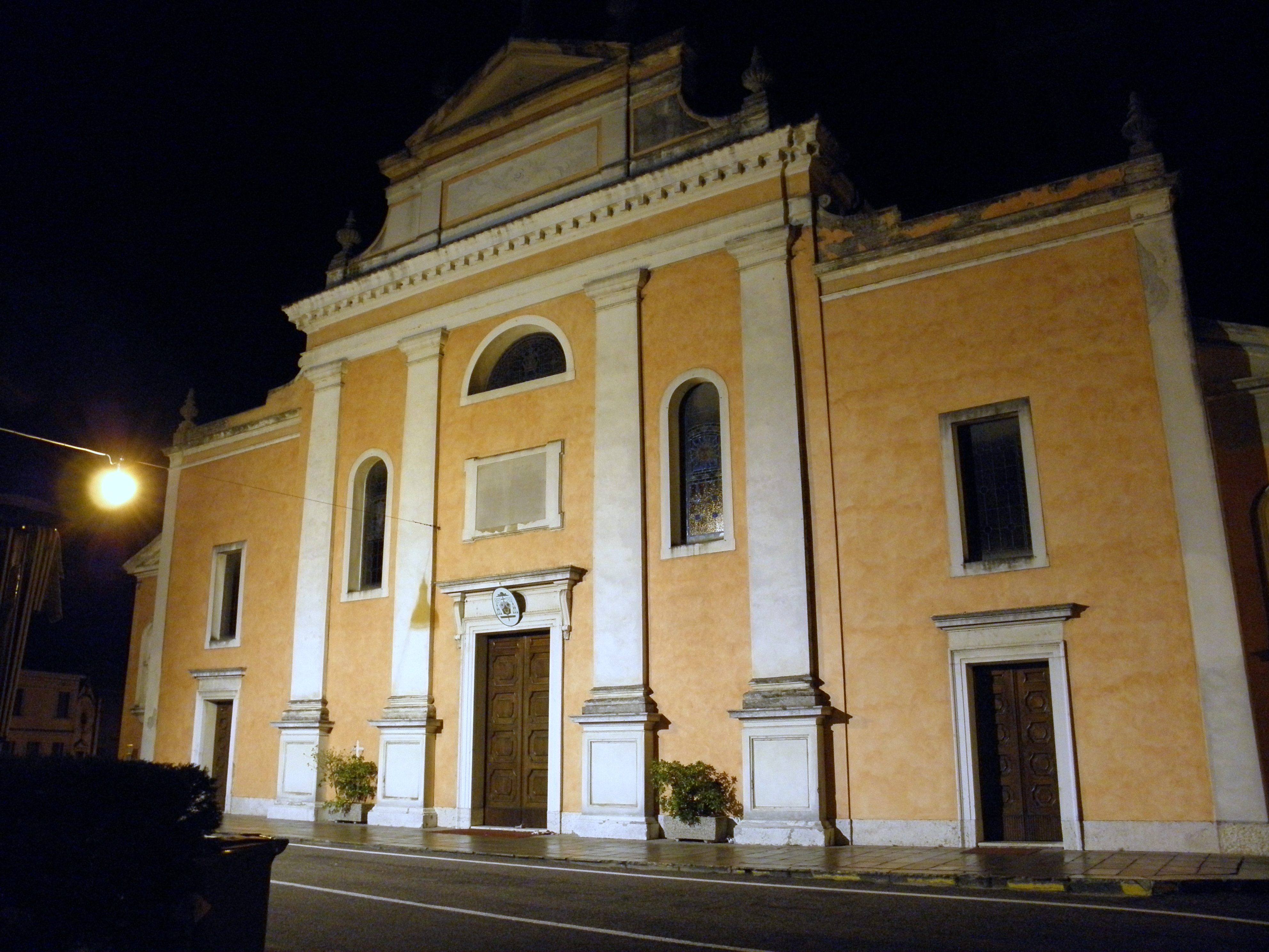 Fiesso Umbertiano: vista notturna della chiesa della Natività della Beata Vergine Maria.